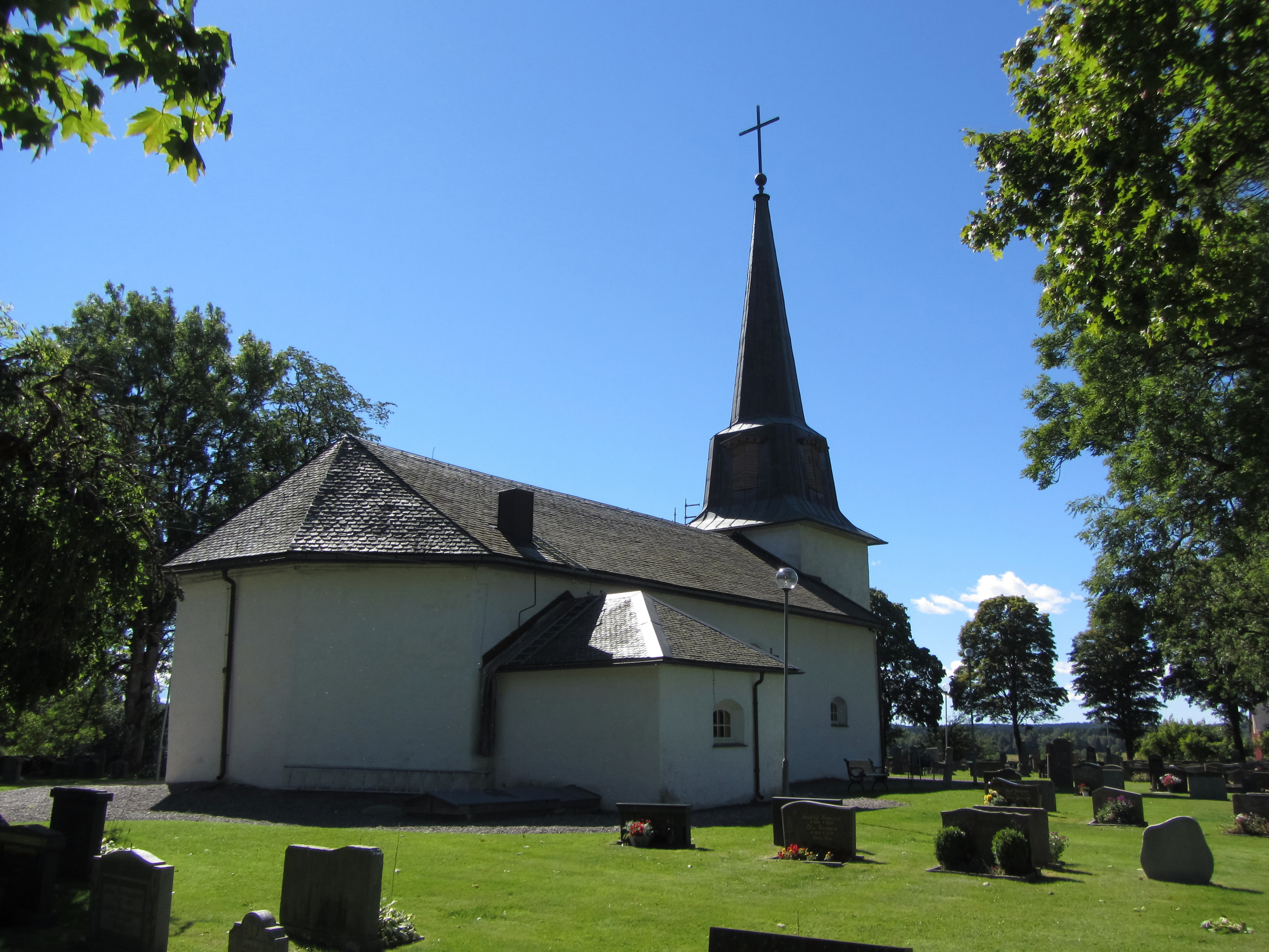 Järbo kyrka och kyrkogård i Dalsland.